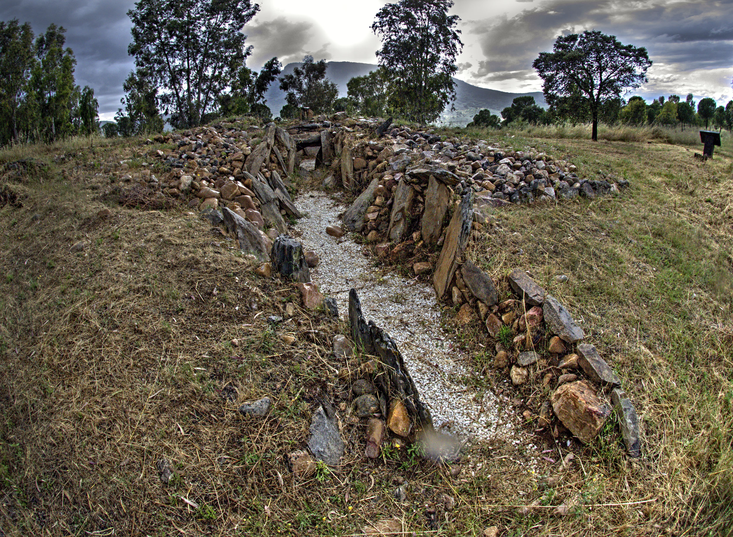 A este megalito se le llama más comúnmente dolmen de Valdecaballeros. Está en una península del embalse García de Sola, antes confluencia de los ríos Guadiana y Guadalupejo. Se le ha datado entre los milenios IV y II a.C. Actualmente conserva una cámara de unos 4 m de diámetro y un corredor de unos 10 m. Se conserva la cobija de entrada a la cámara.